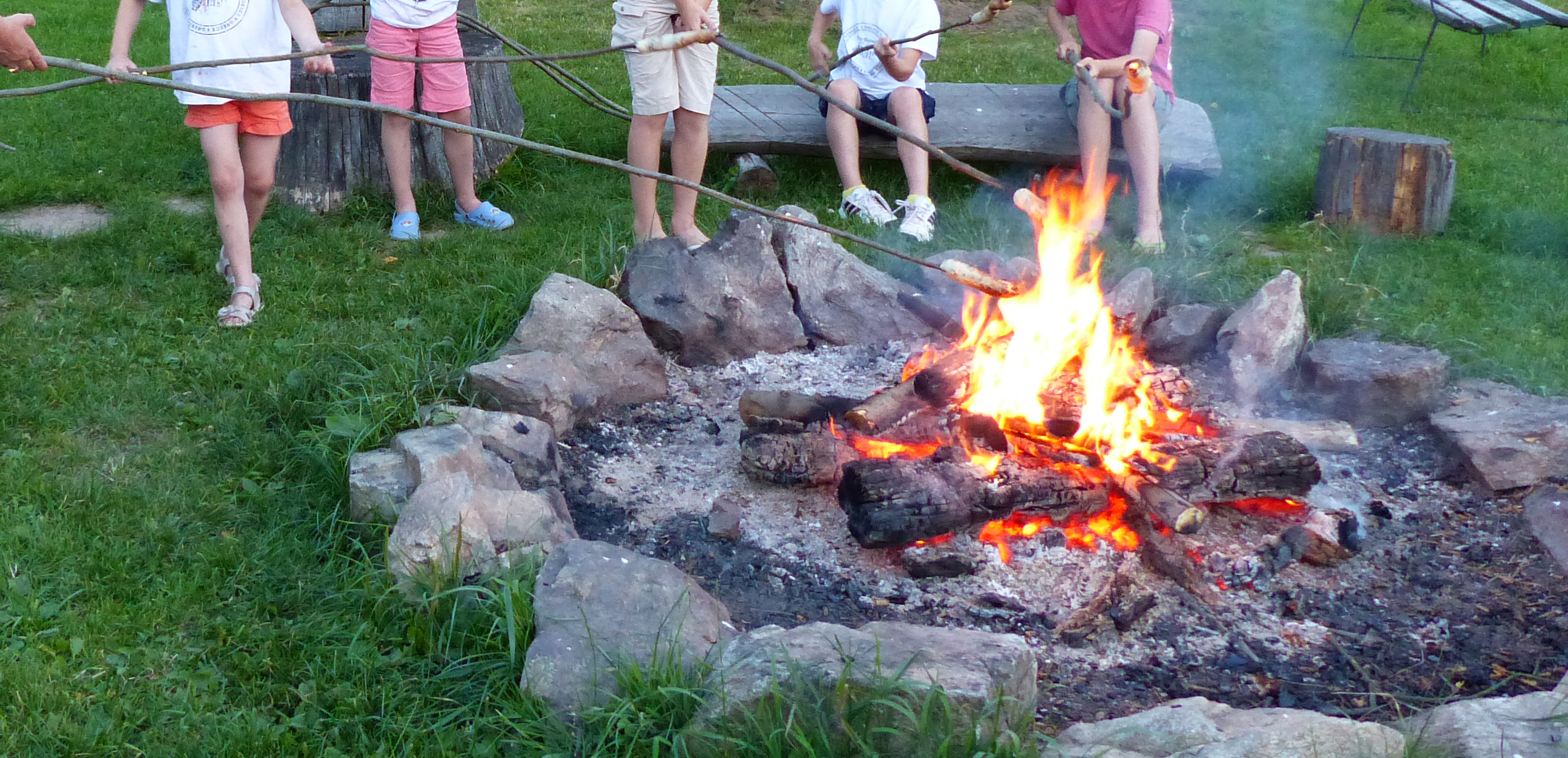 Backen von Knüppelbrot (Stockbrot) am Lagerfeuer, Kleines Vorwerk in Sayda, Sachsen